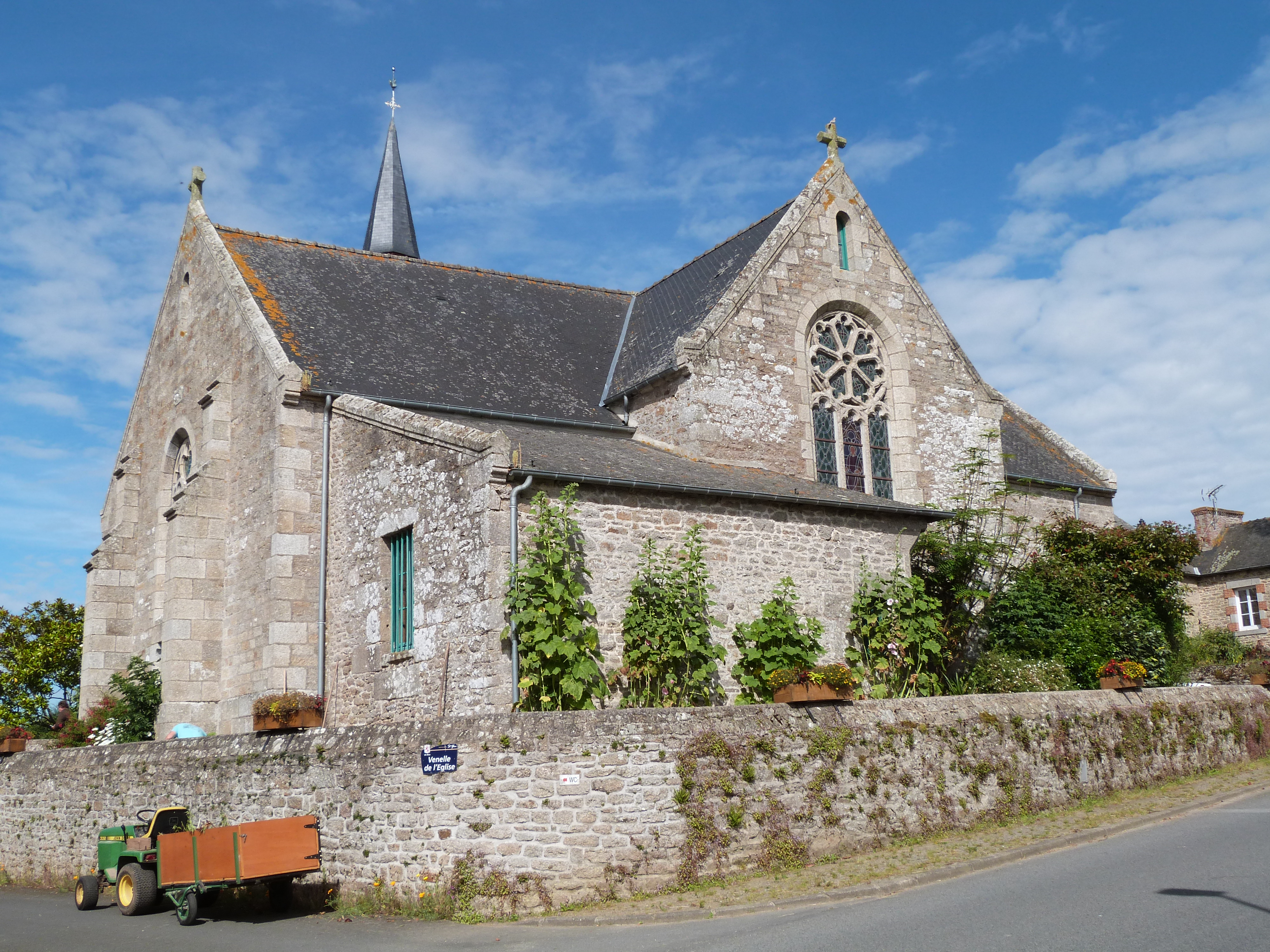 L'église Saint-Etienne et son mur d'enceinte à Saint-Glen